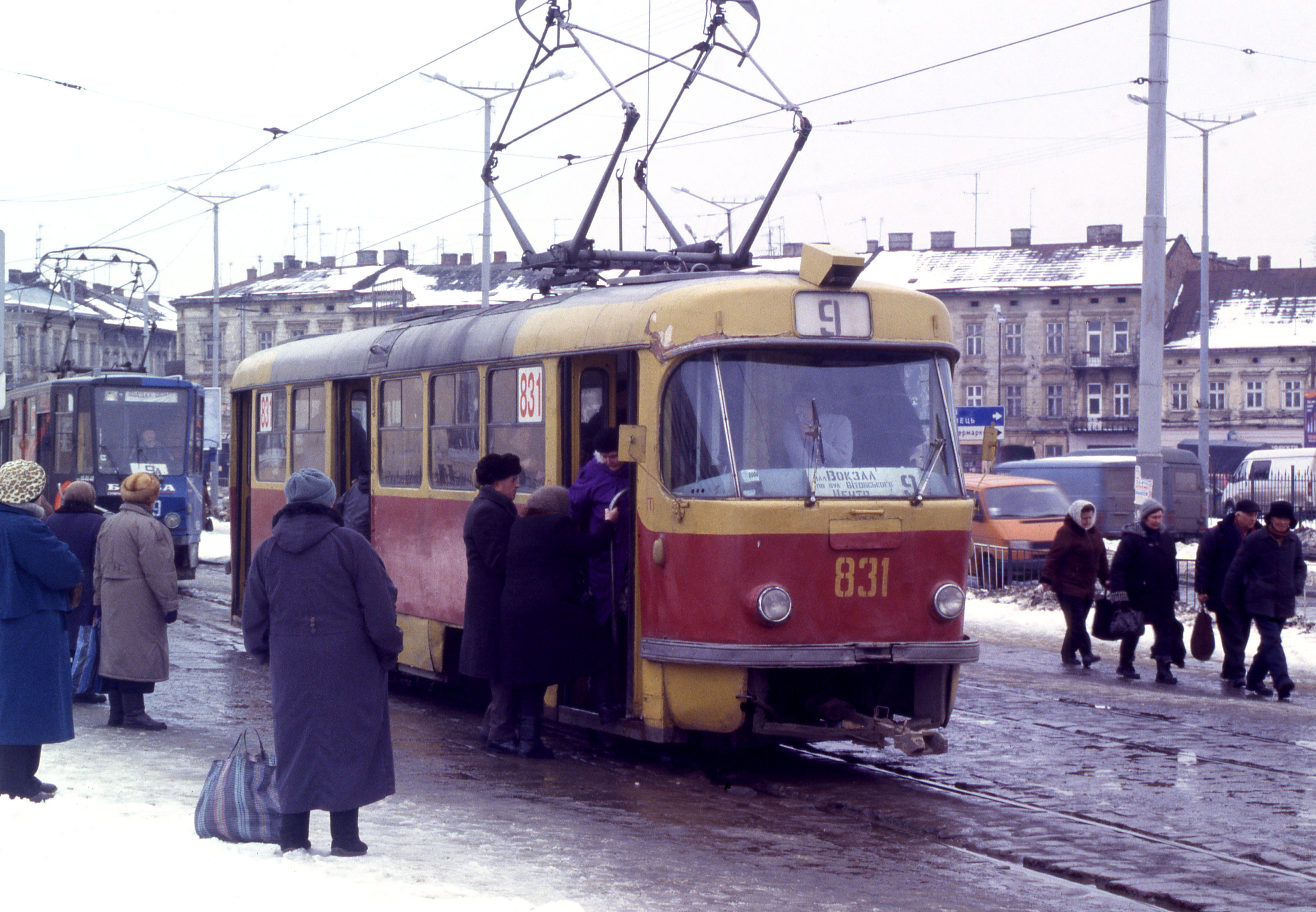 Trams in Lviv terwijl er nog een dikke pak sneeuw ligt in maart.